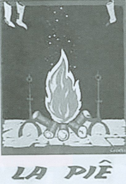 Copertina della rivista di cultura romagnola «La Piê»